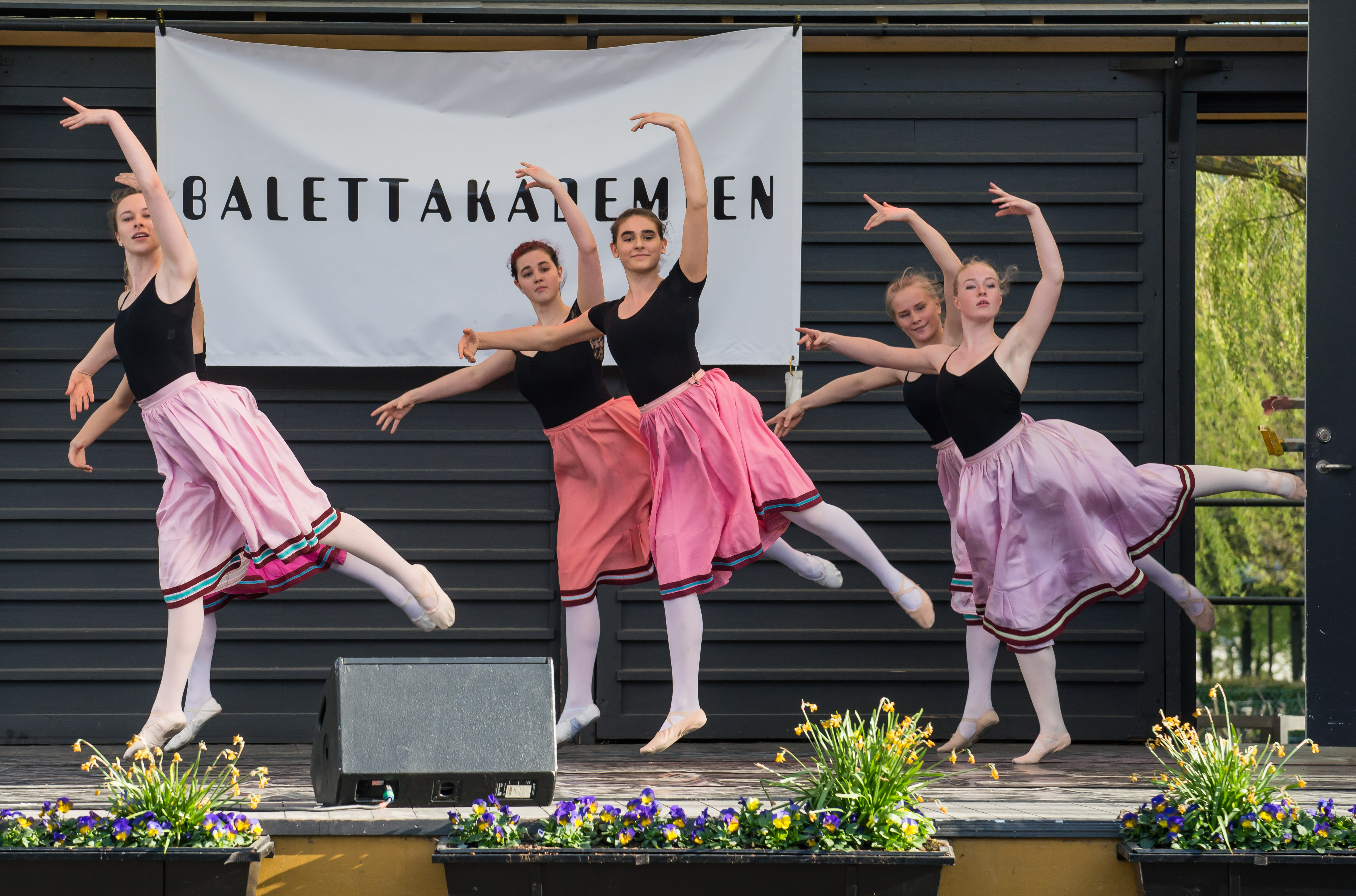 Föreställning med elever från Balettakademien på Balettakademiens Dag i Kungsträdgården den 6 maj 2015.